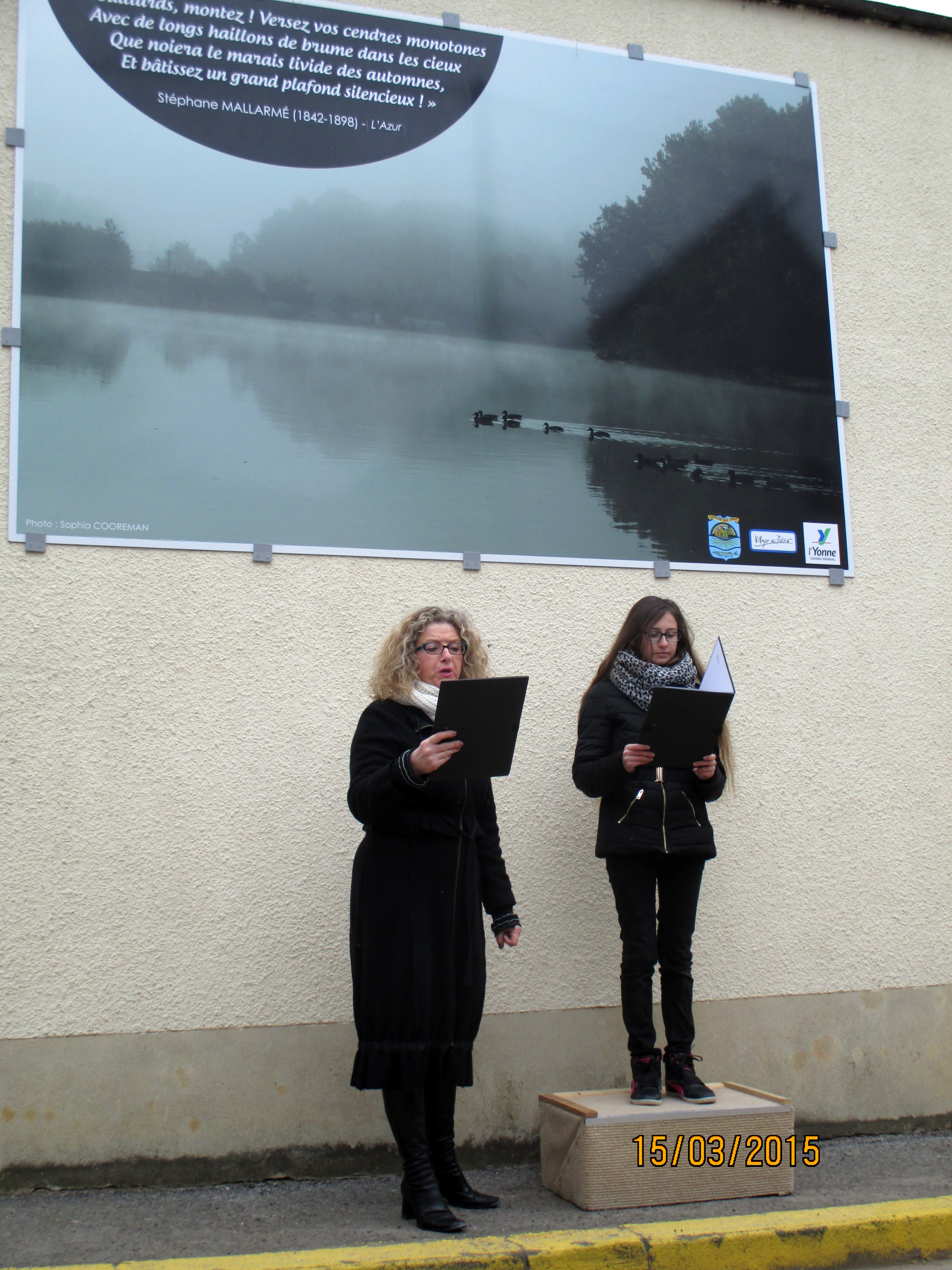 Courlon-sur-Yonne (Yonne, france) ; village en poésie, à l'occasion de la 17e édition française des journées de la poésie. Inauguration de tableaux poétiques dans le village.